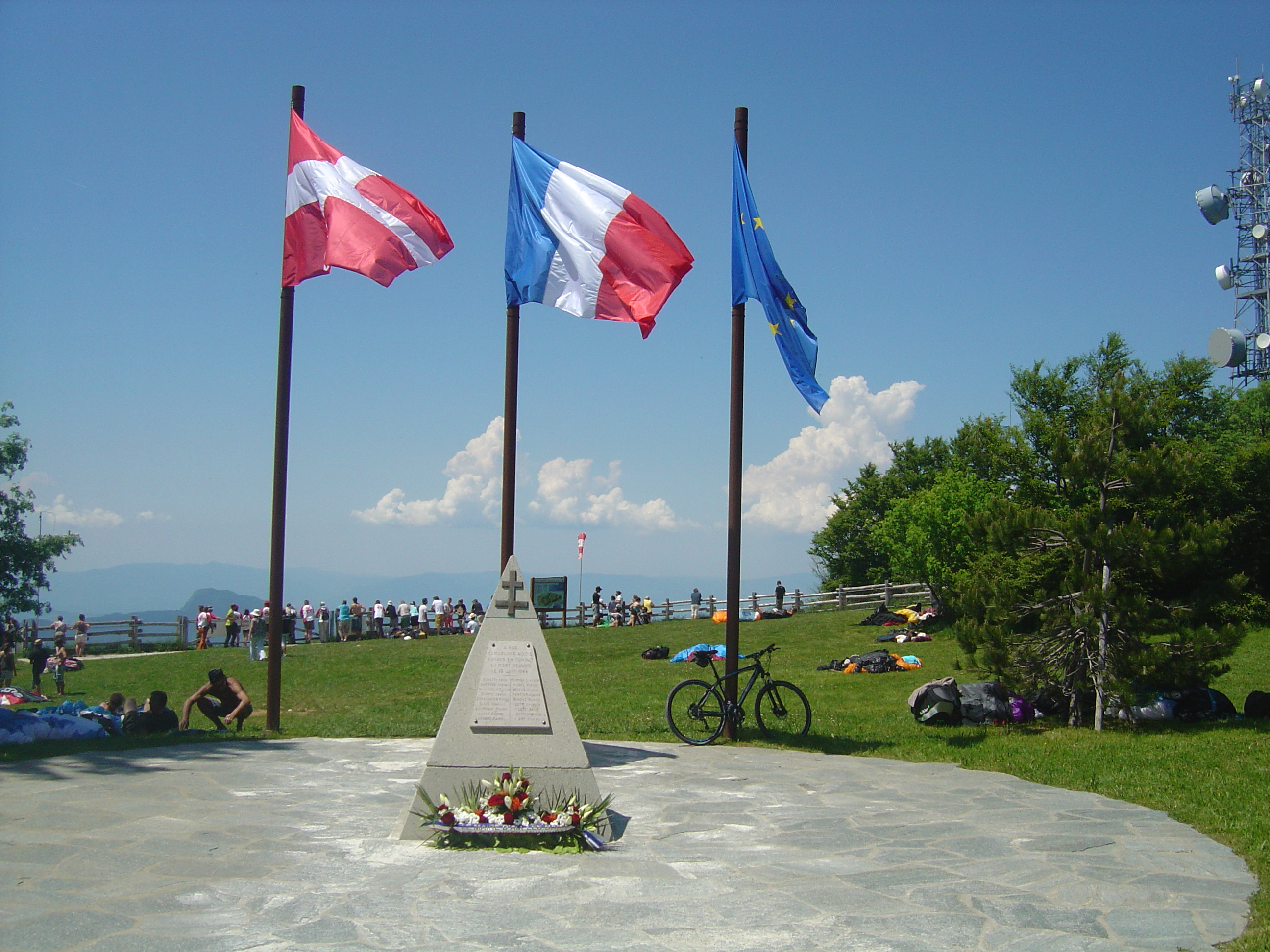 Stèle en l'honneur de résistants morts au combat le 10 juin 1944 au mont Revard